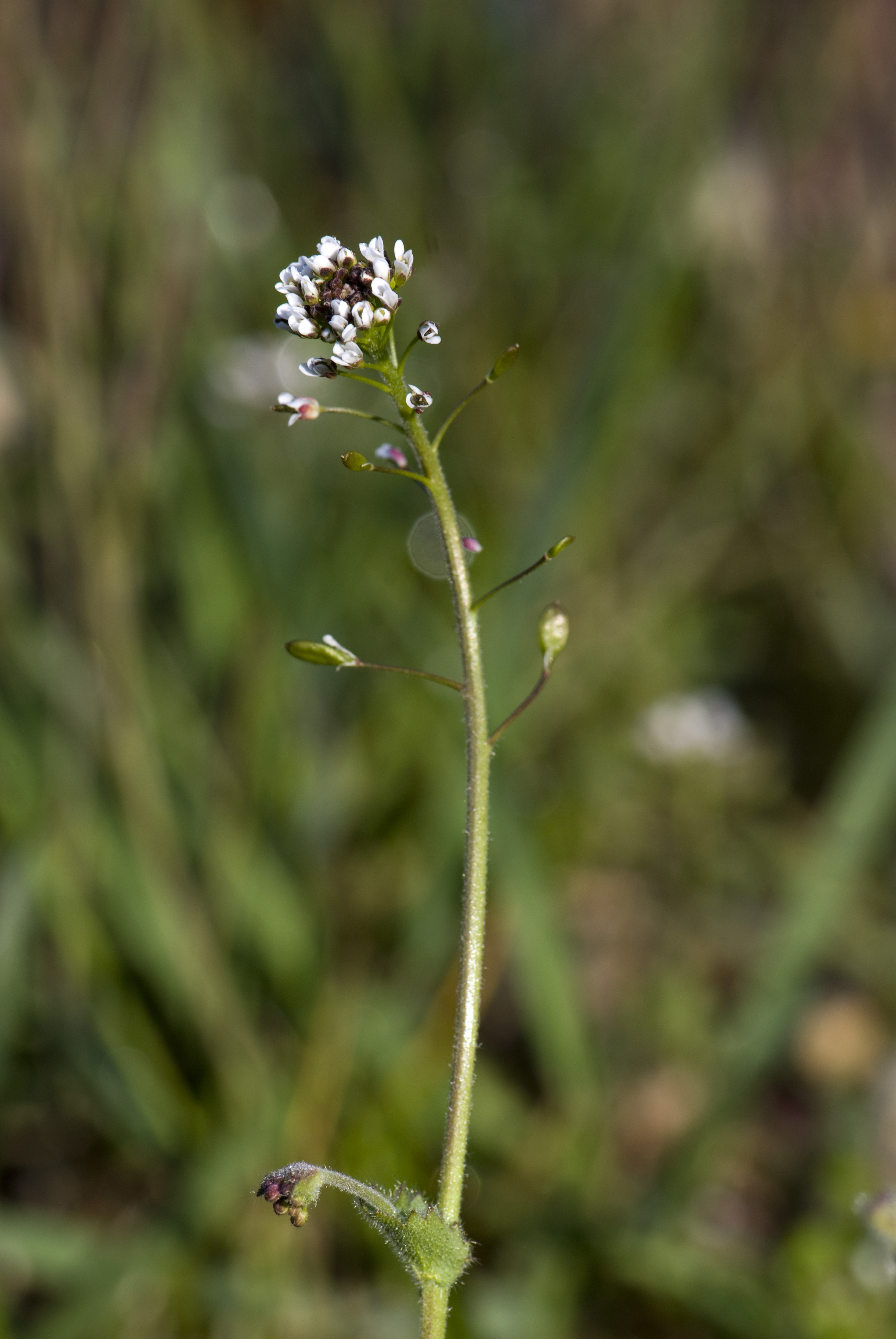 Draba muralis Route d'Ailly-sur-Meuse (Meuse), France